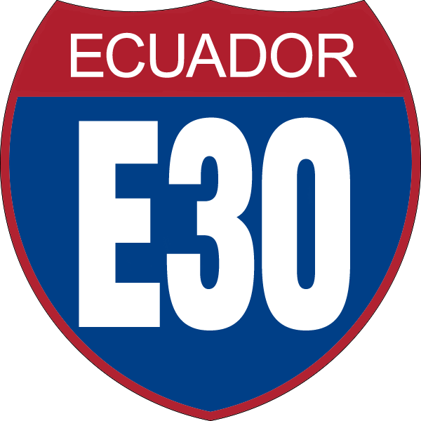 Disco de Identificación Ruta Nacional E30